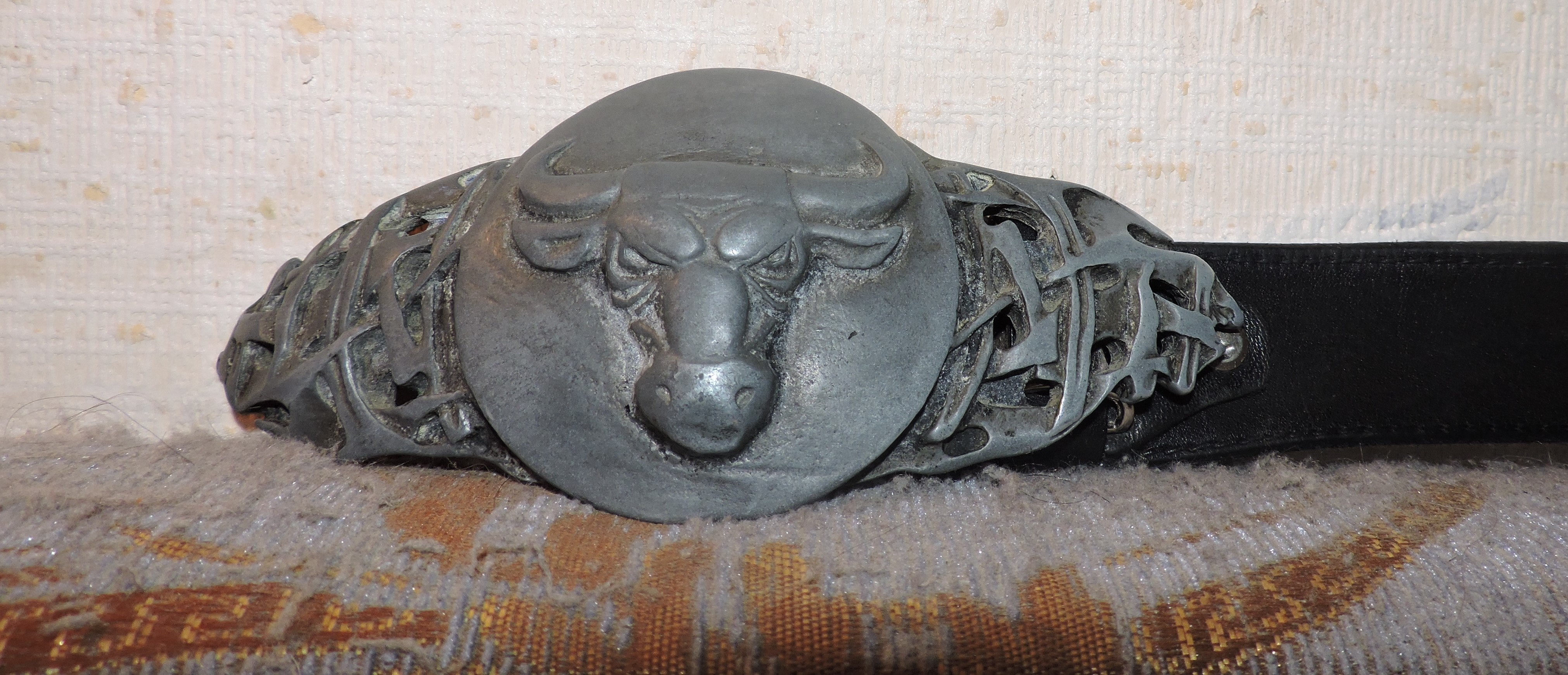 Ремень Чугунный Буйвол